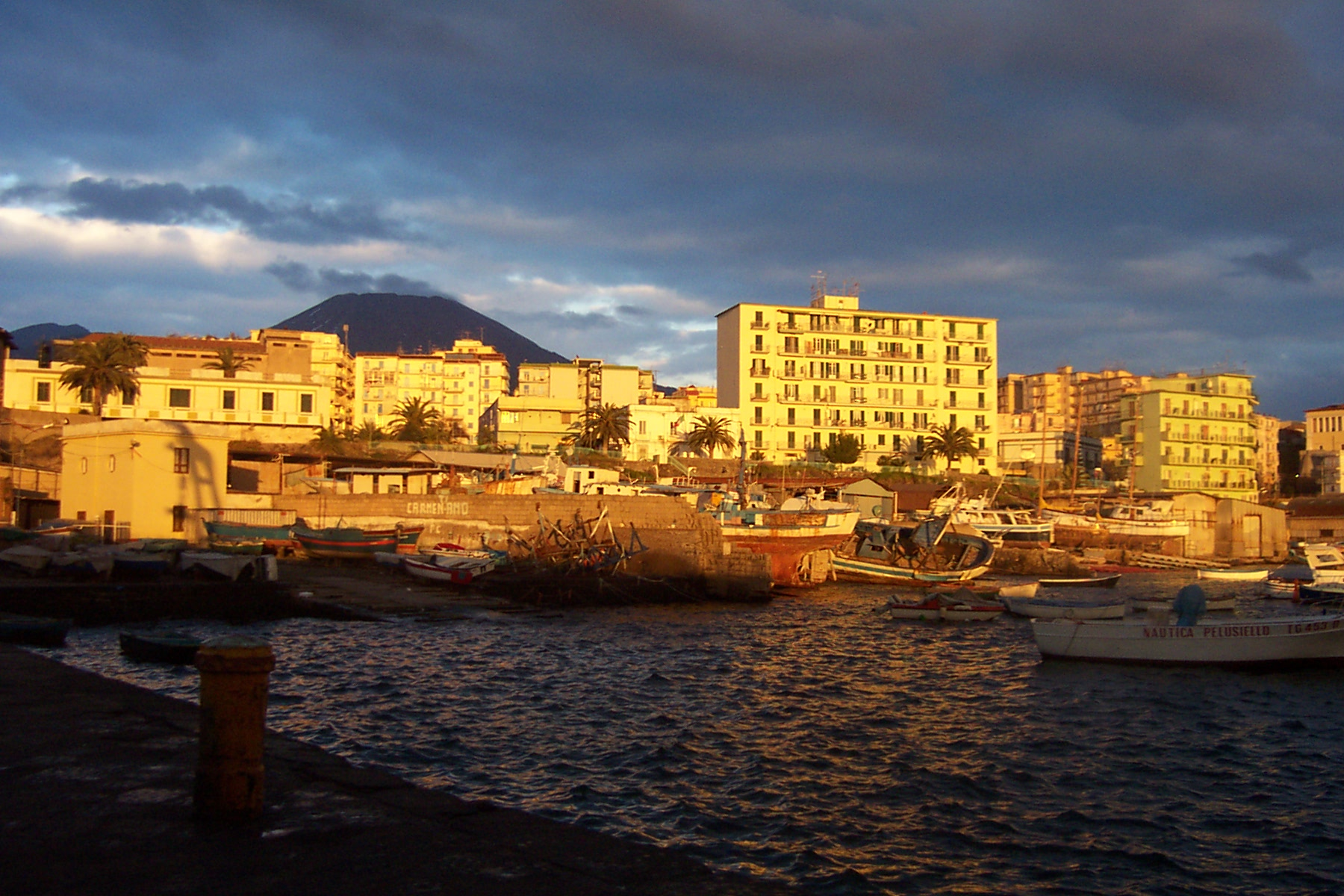 Foto di Torre del Greco scattata dal porto della città. Alle spalle dei palazzi spicca la cima del Vesuvio.